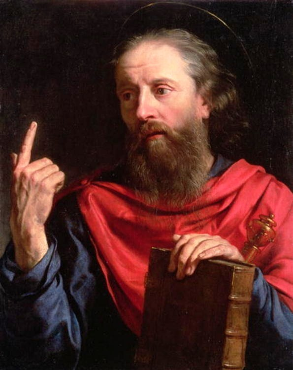 Saint Paul